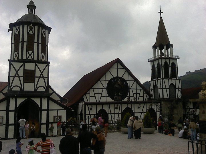 Colonia Tovar, estado Aragua - Venezuela (2003)